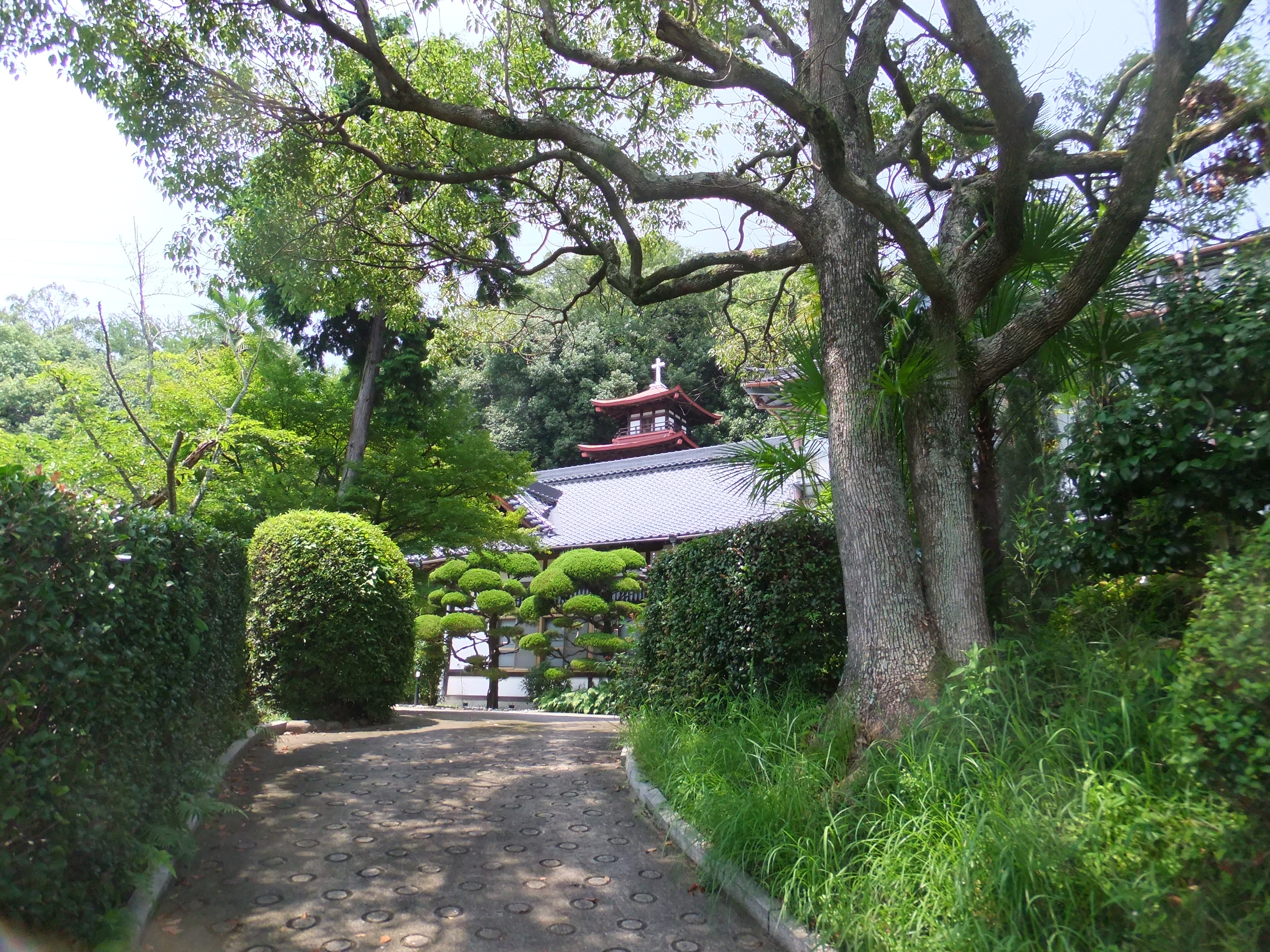 イエズス会長束修道院